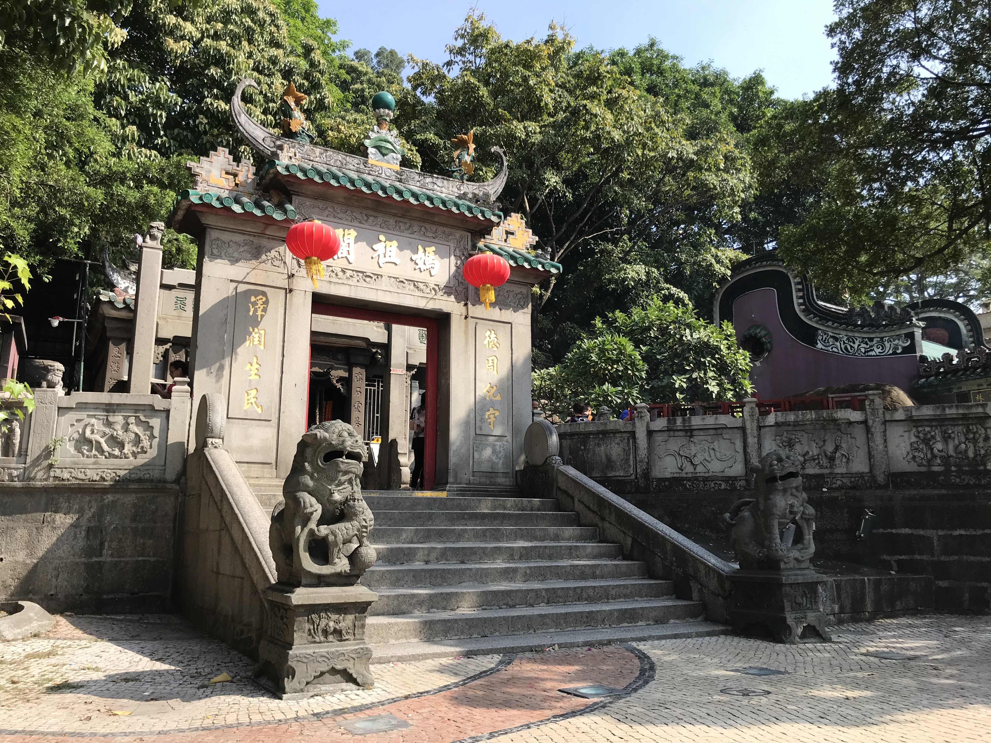 澳門媽祖閣的山門